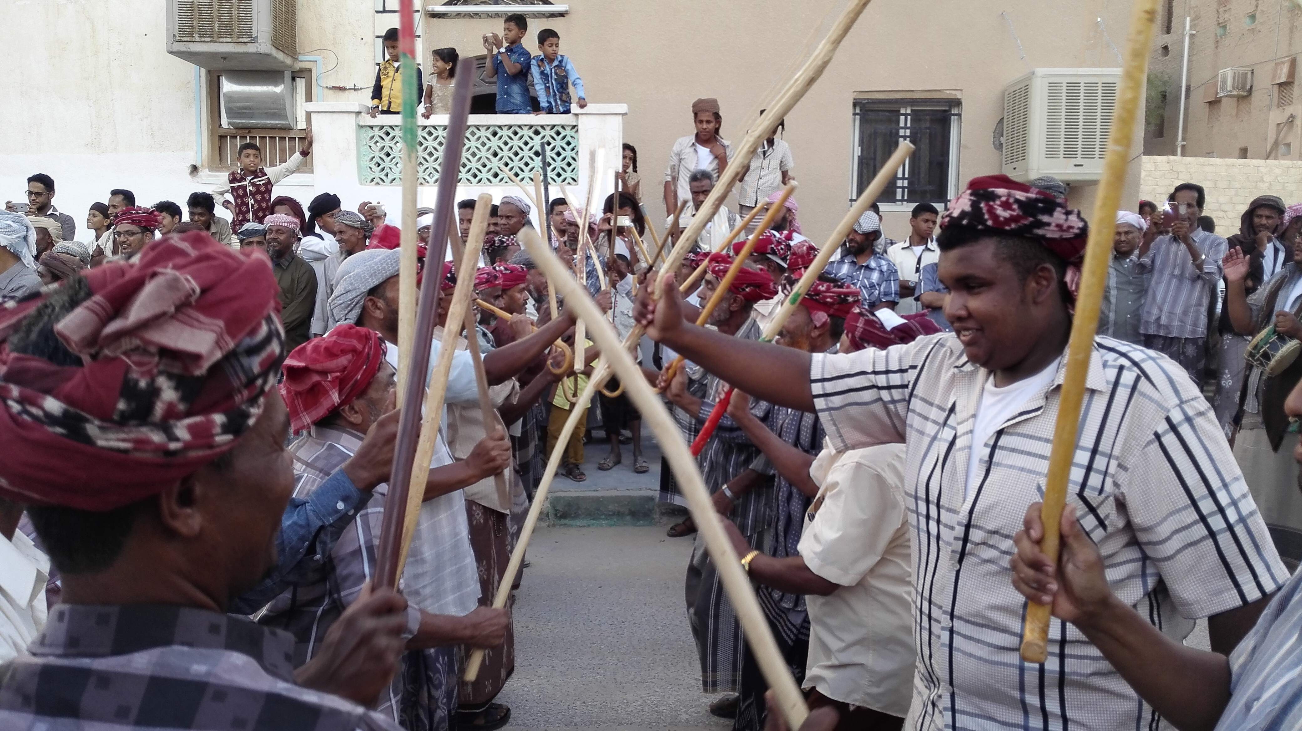 الشبواني رقصة شعبية تنسب في تسميتها إلى مدينة شبوة في اليمن, وتعتبر رقصة الشبواني من أبرز الألعاب الشعبية في حضرموت